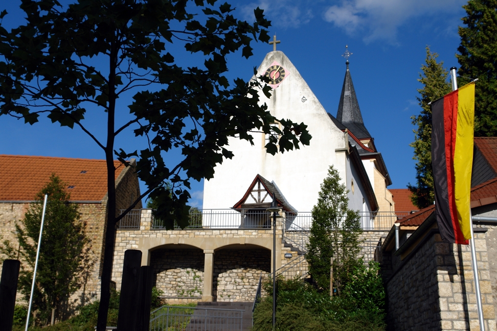 Church in Soergenloch, Germany